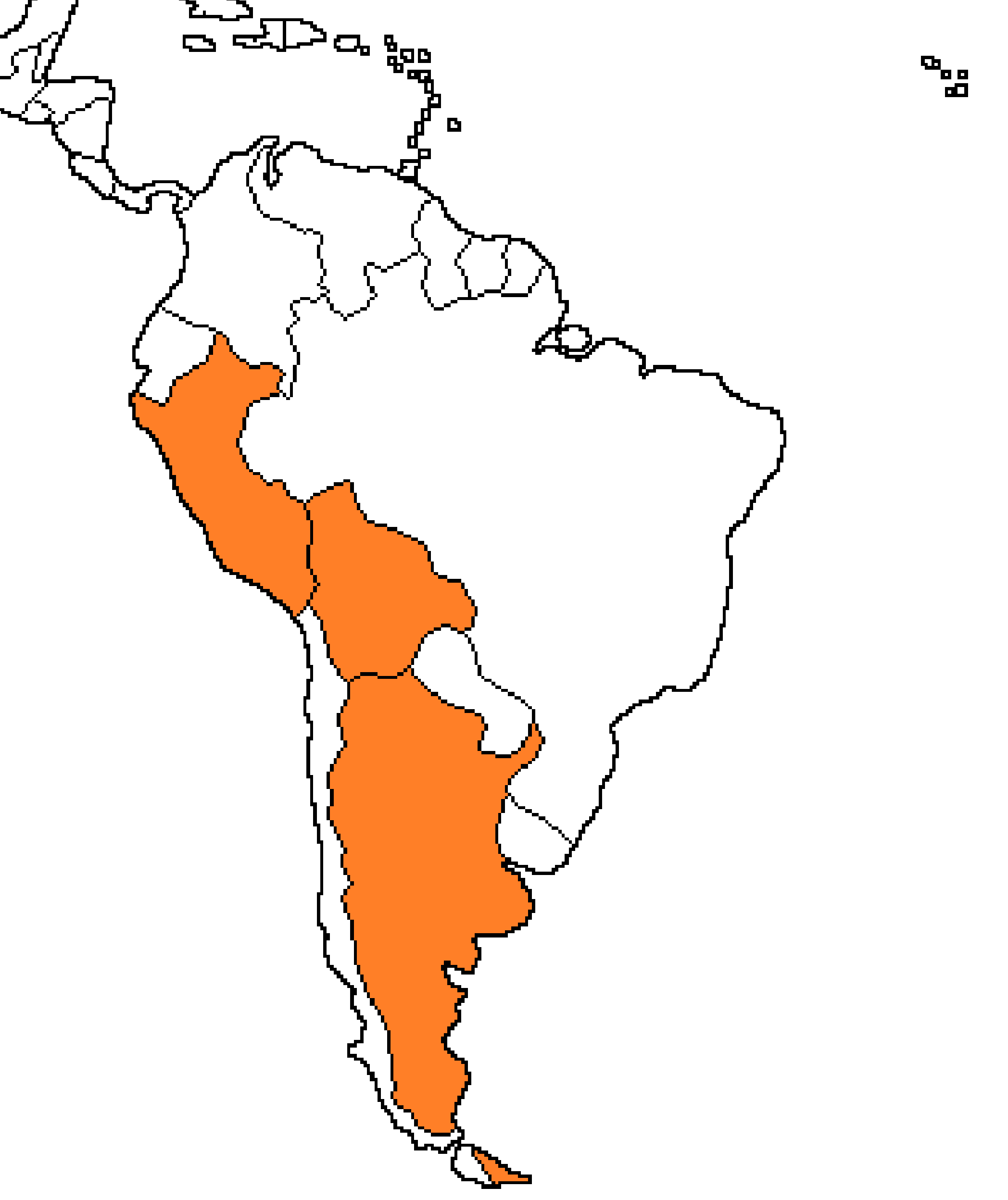 Paises donde se disputara el Dakar Rally 2018